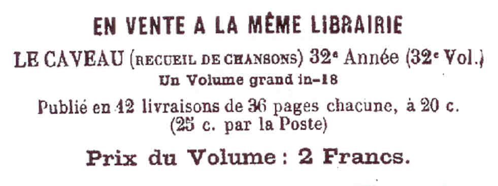 Annonce pour le Caveau